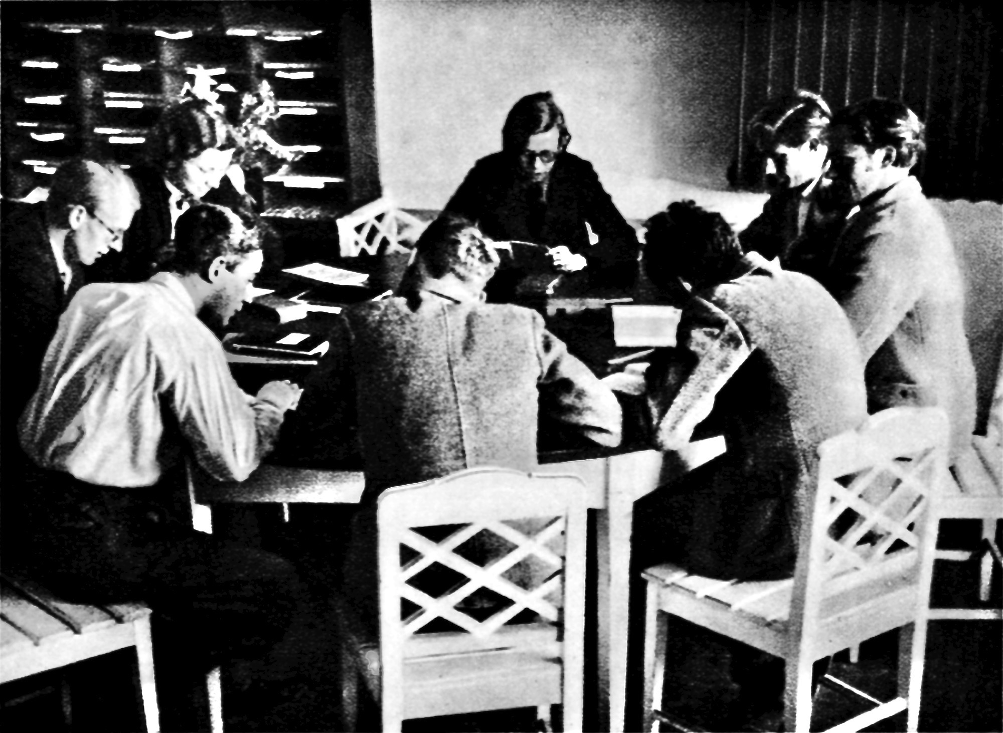 Der Unterricht im kleinen Kreis war Standard an der 'Schule am Meer'; Frontalunterricht gab es nicht.